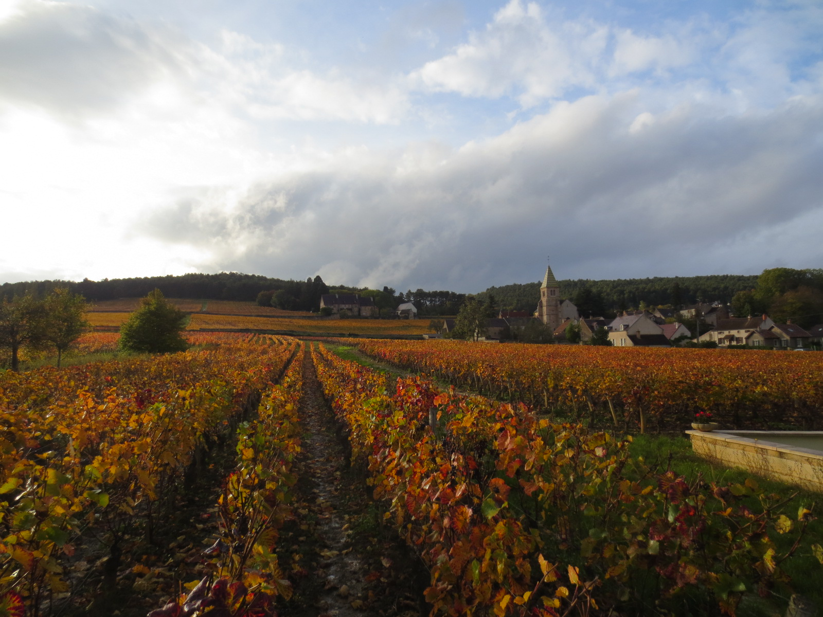 Vignoble de Fixin et manoir de La Perrière de Fixin